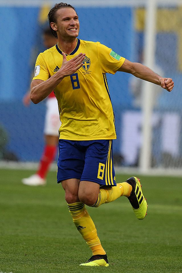 Сборная Швеции зрелищно вышла в четвертьфинал ЧМ-2018